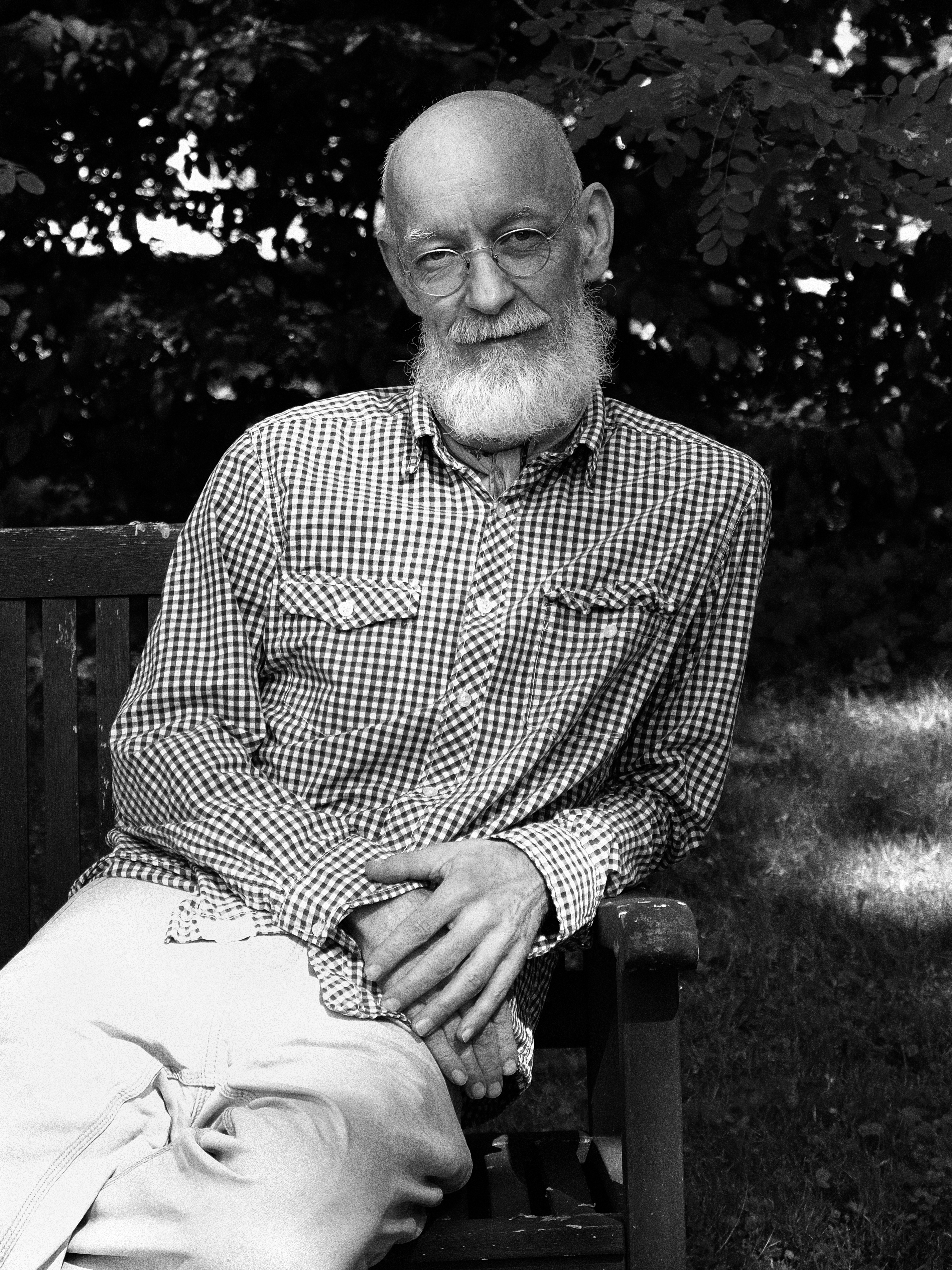 Thomas Fehlmann, aufgenommen im Park von Sternhagen Gut (2020)